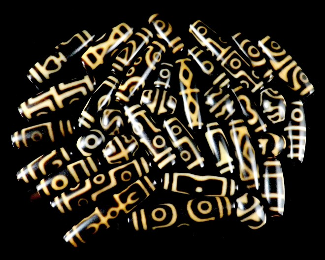 Dzi Beads